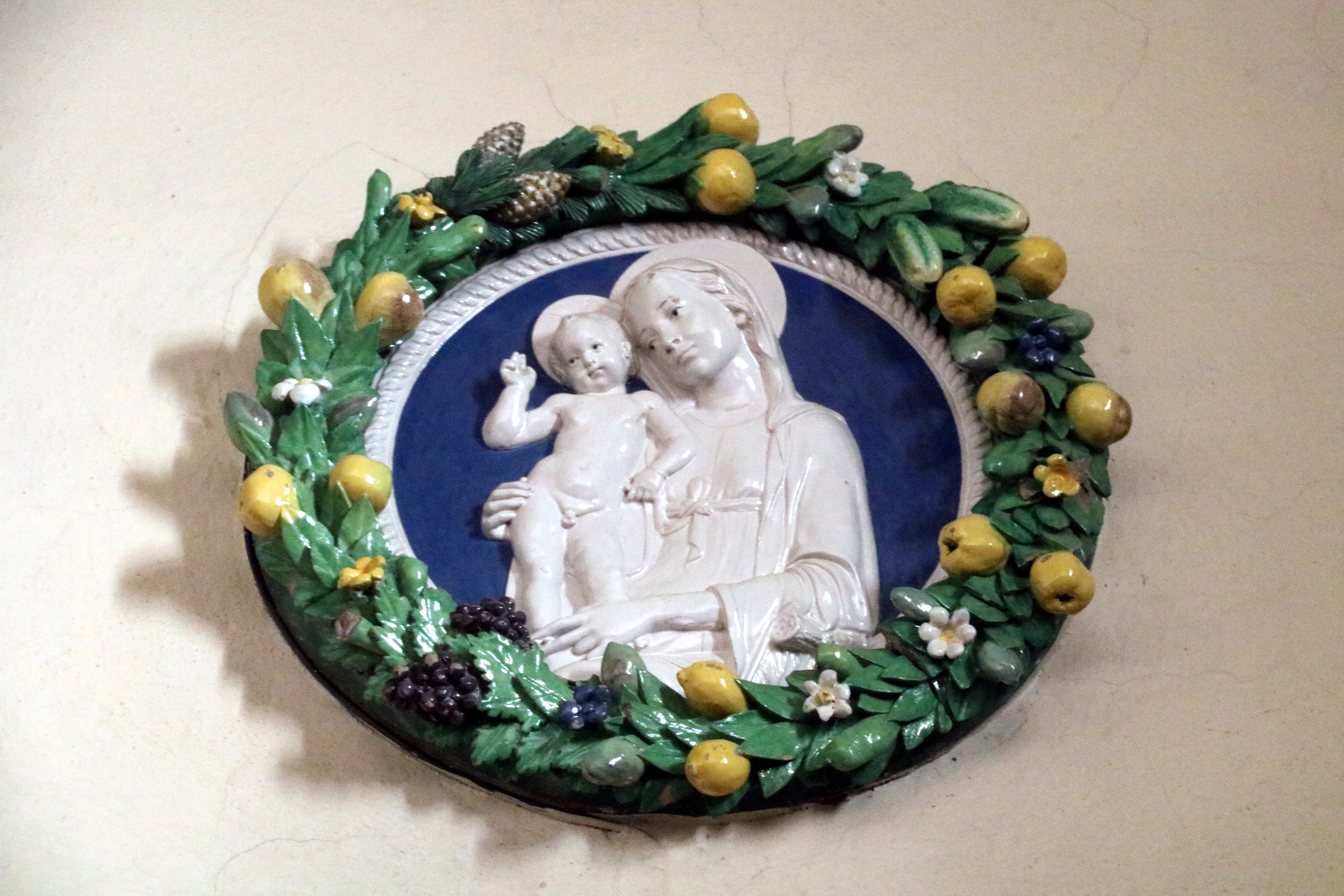 Andrea della Robbia e bottega, Madonna col Bambino benedicente, 1490-1495, cappella delle Stimmate, Santuario della Verna